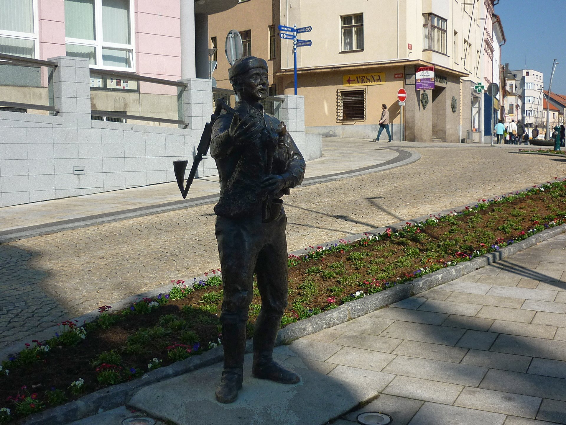 Socha Strakonického dudáka na Velkém náměstí ve Strakonicích